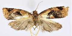 Isodemis quadrata MALE